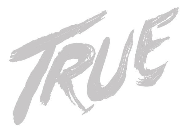 Logotipo del nombre de la portada del álbum True de Avicii